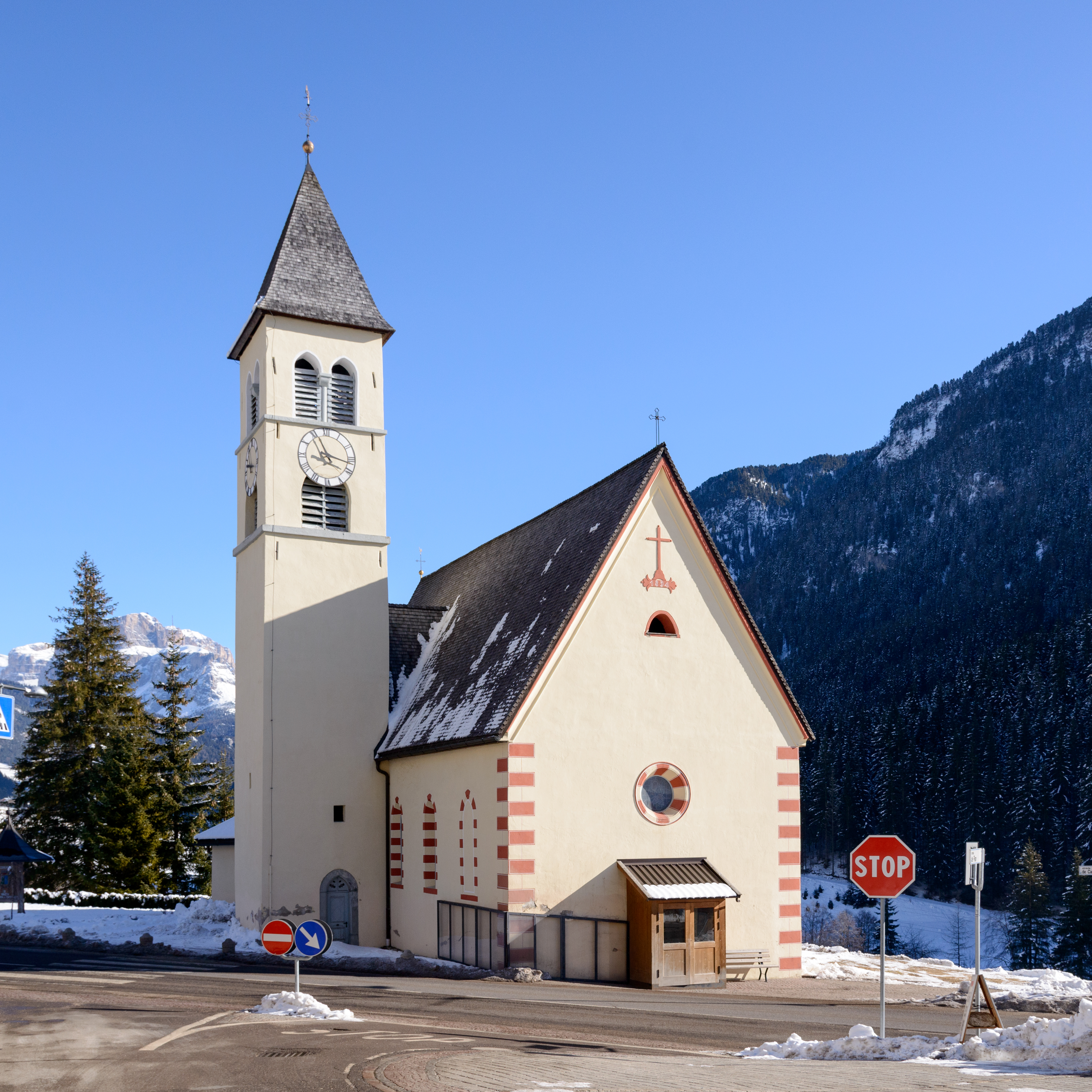 Chiesa parrocchiale di Santa Maria Maddalena a Mazzin (TN) in Trentino Alto Adige